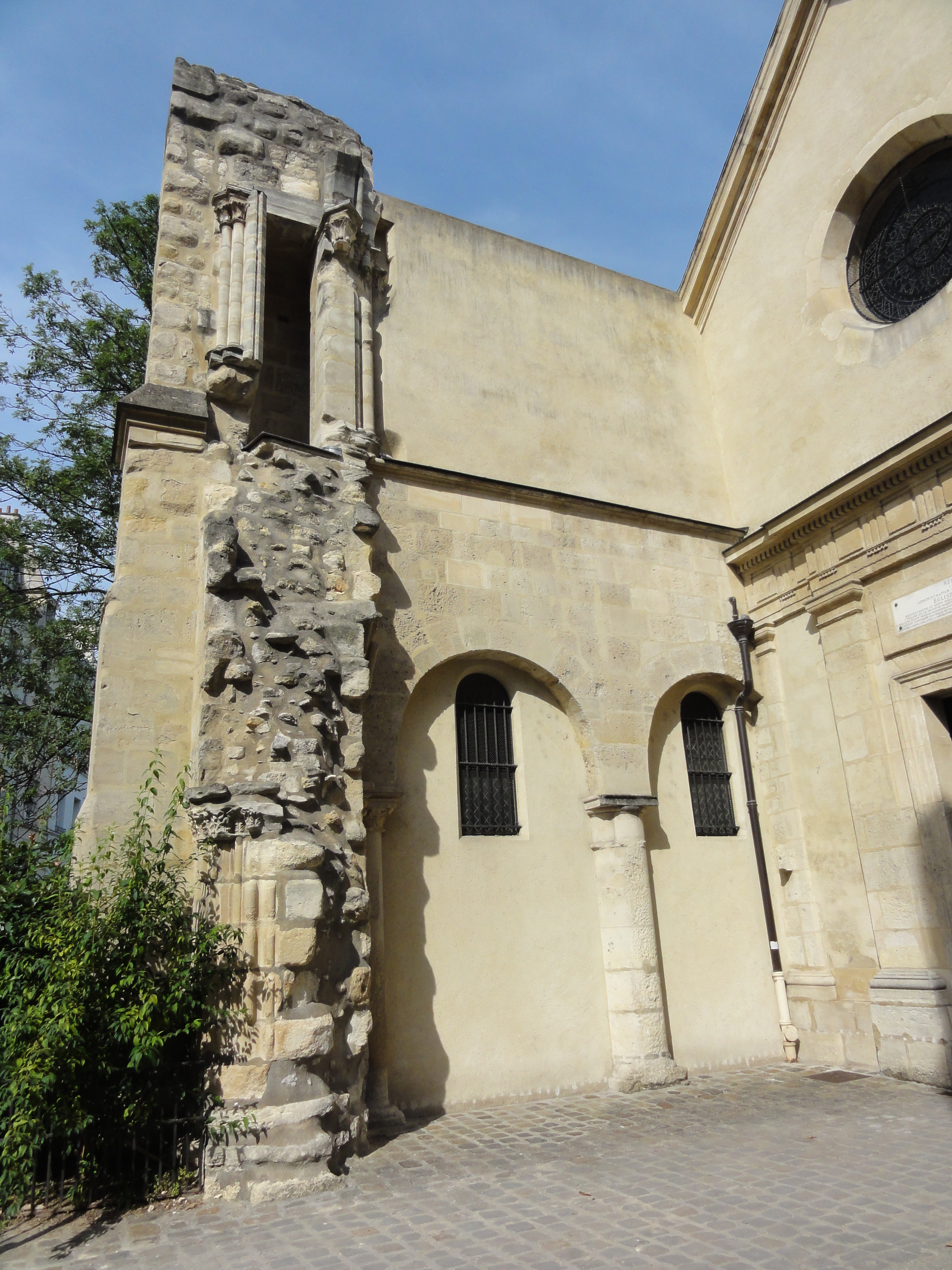 Nef, 1ère et 2e travée, élévation nord (vestiges).